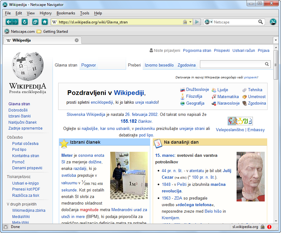 Netscape Navigator 9.0.0.6 v Windows 7